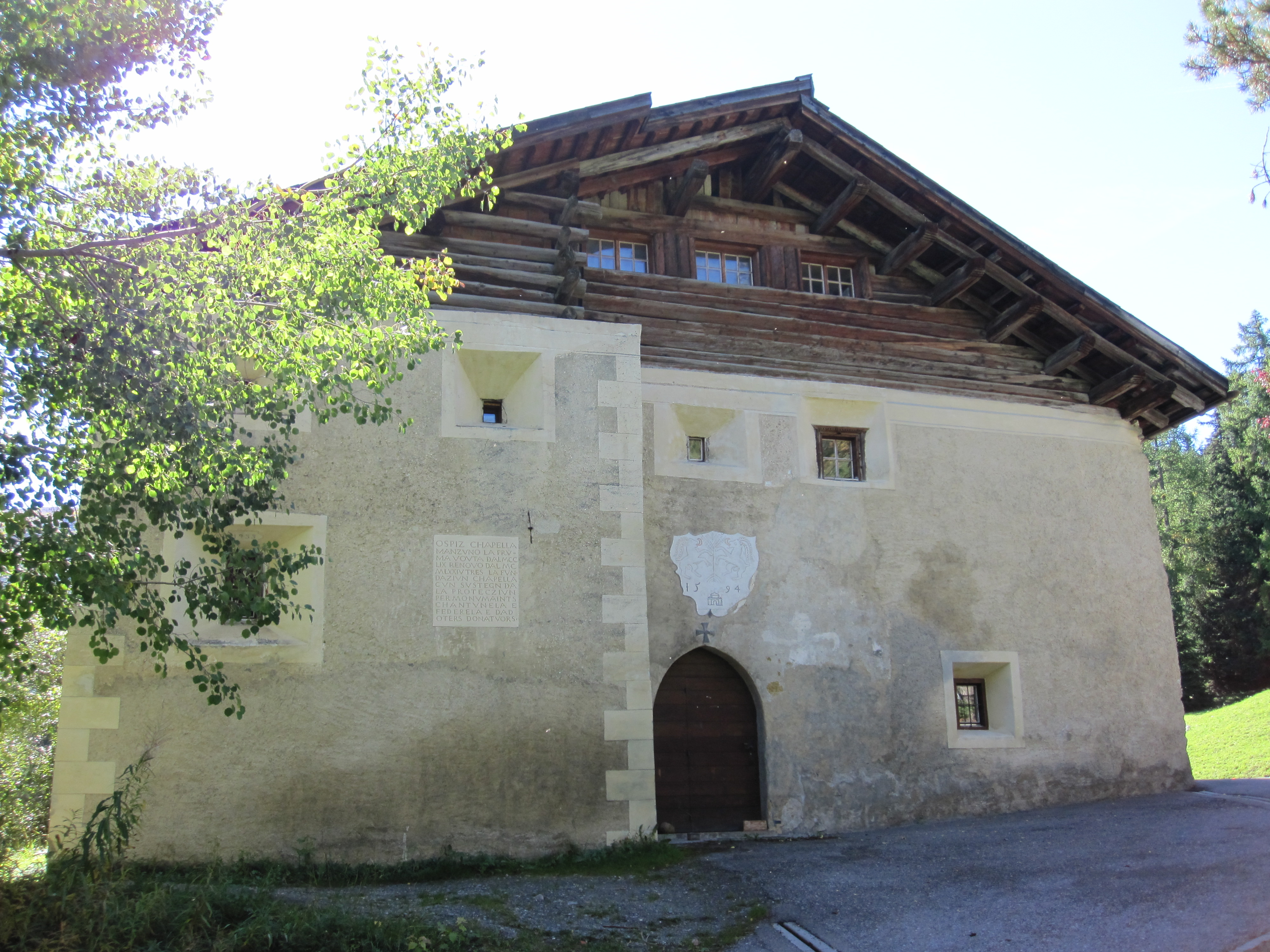 ehemaliges Hospiz (heute Jugendhaus) in Chapella (politisch zu S-chanf gehörig)